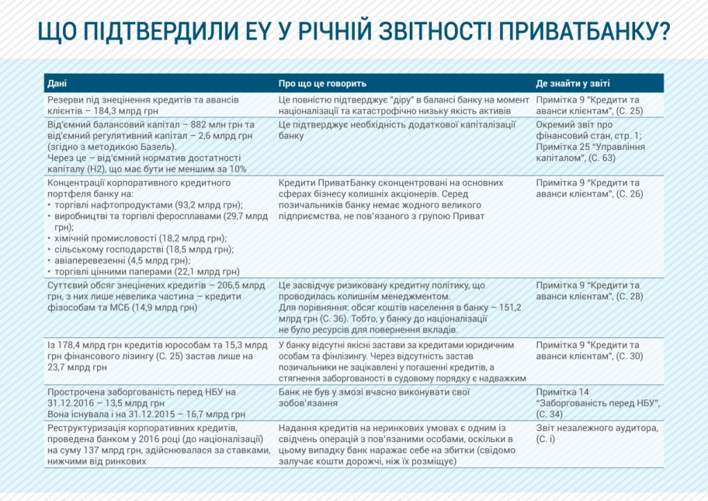 Що підтвердили E&Y в річній звітності "ПриватБанку"